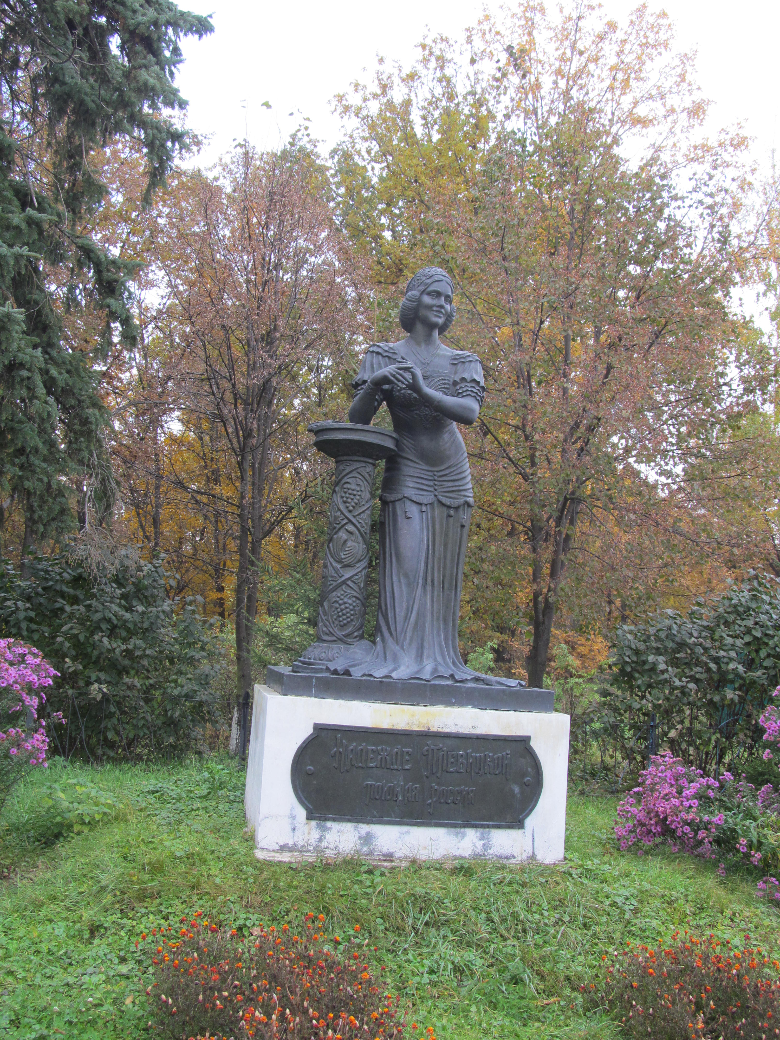 Памятник Надежде Плевицкой в селе Винниково Курской области.